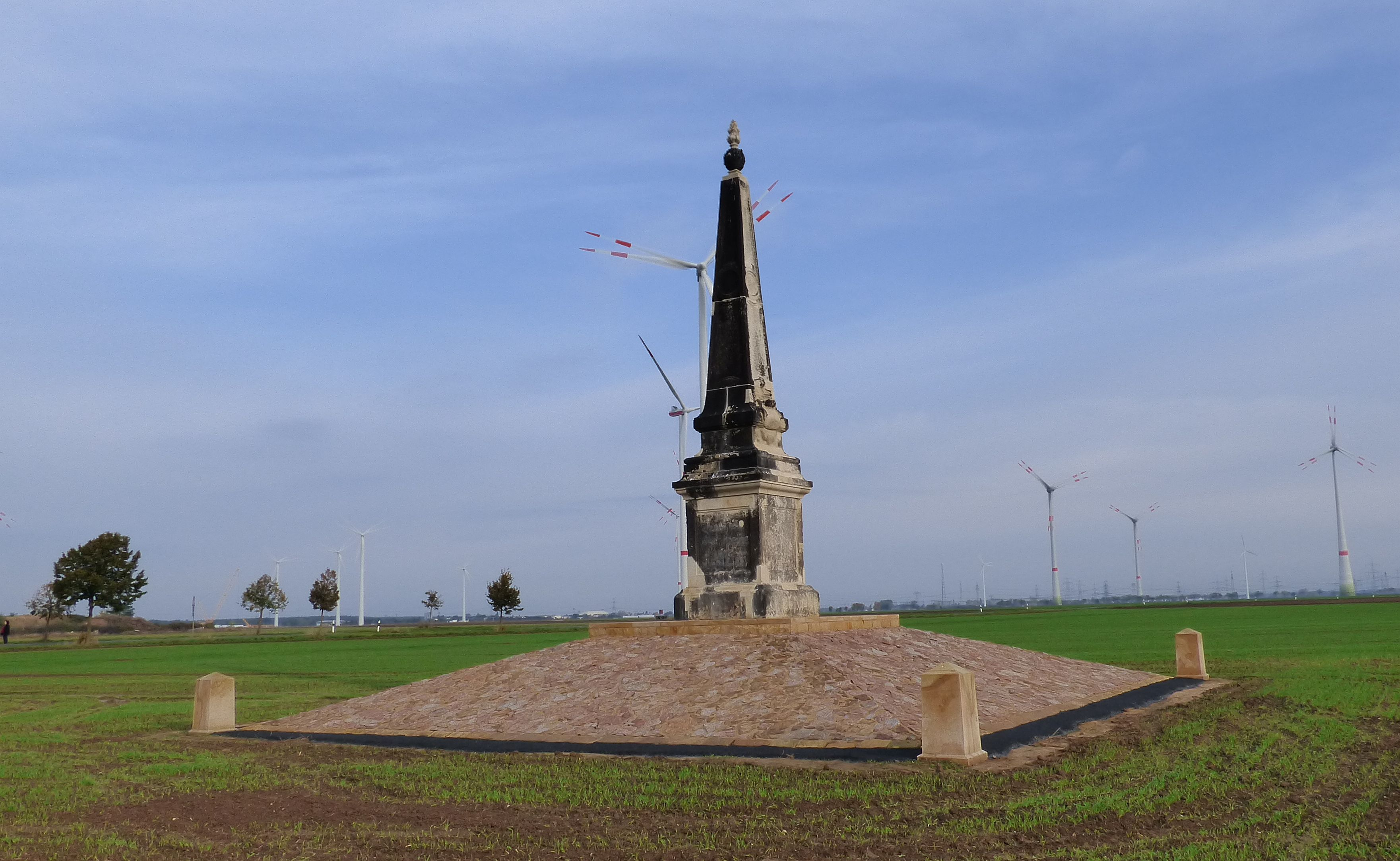 Obelisk des Zeithainer Lustlagers nahe Glaubitz